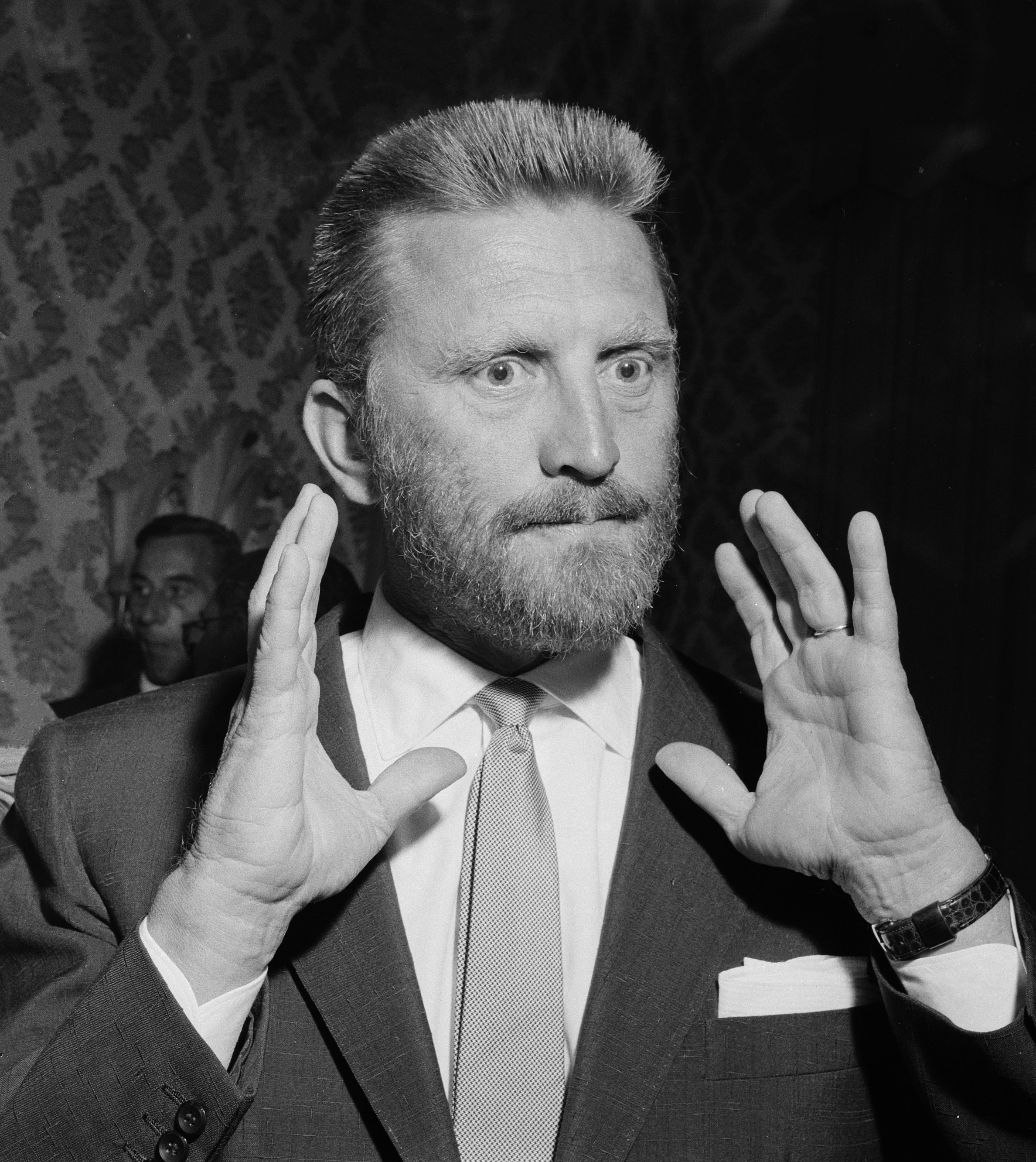 Amerikaanse filmster Kirk Douglas in Amsterdam. Hij is Nederland voor opnames van de film "Lust for Life" (regie: Vincente Minelli) over het leven van Vincent van Gogh